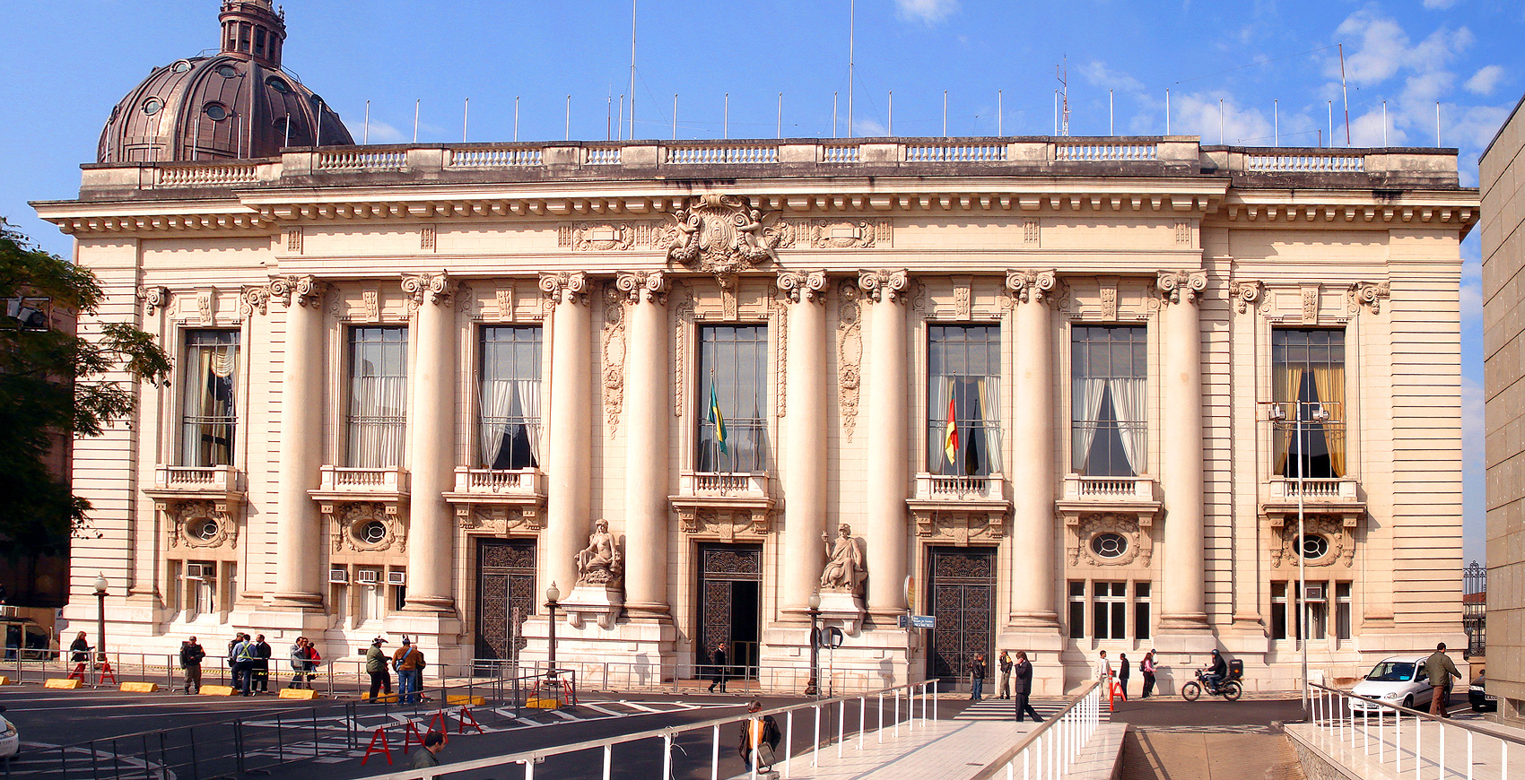 Palácio Piratini, sede do governo estadual do Rio Grande do Sul. Porto Alegre, Brasil.